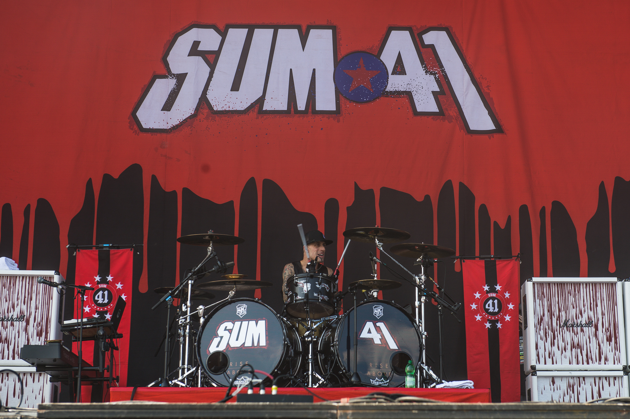 ARGO-Konzerte,Frank Zummo,Konzert,Livekonzert,Livemusik,Musik,RiP,Rock im Park 2017,Sum 41,Zeppelin Stage